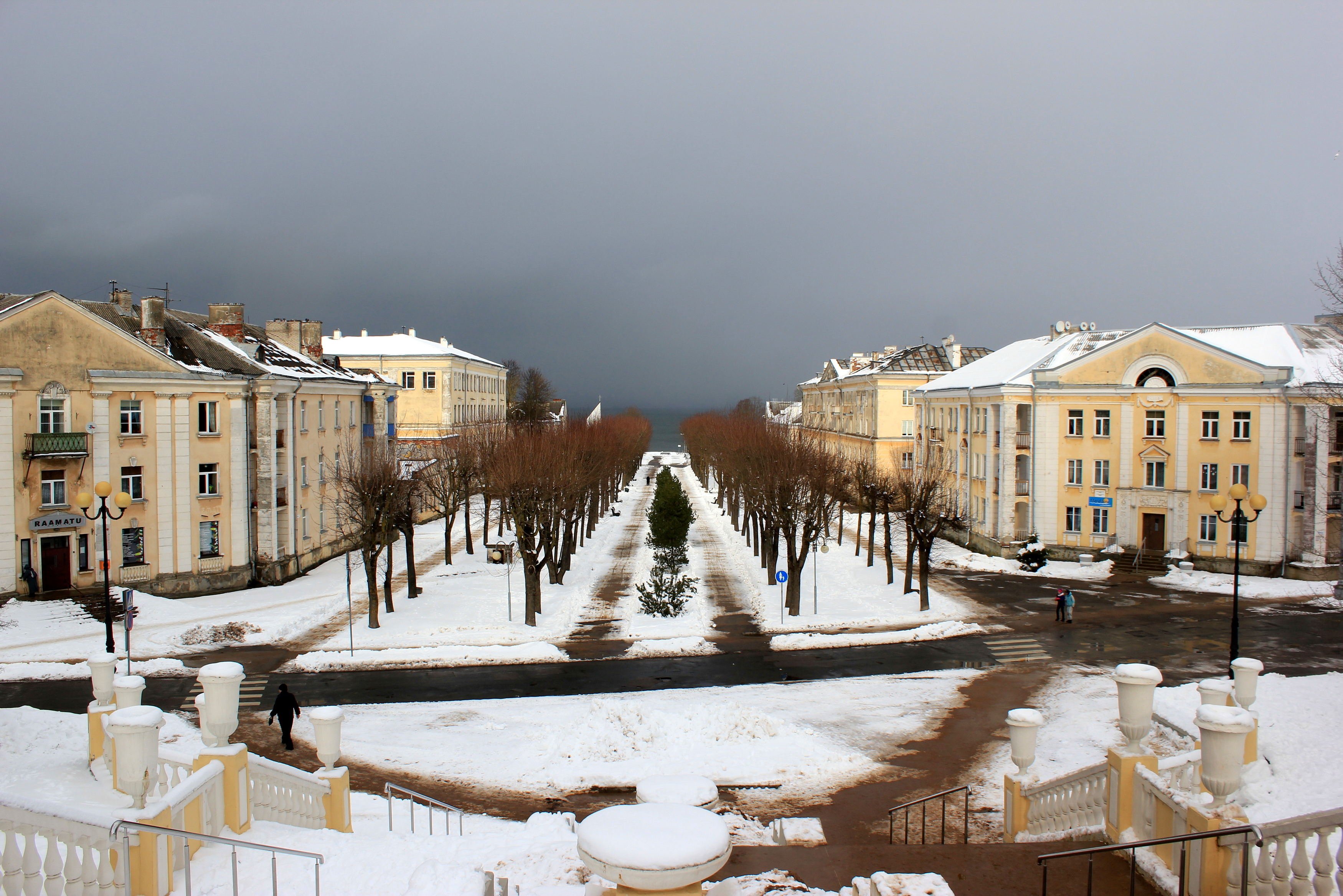 Hornjoserbsce: W měsće Sillamäe, Estiska.